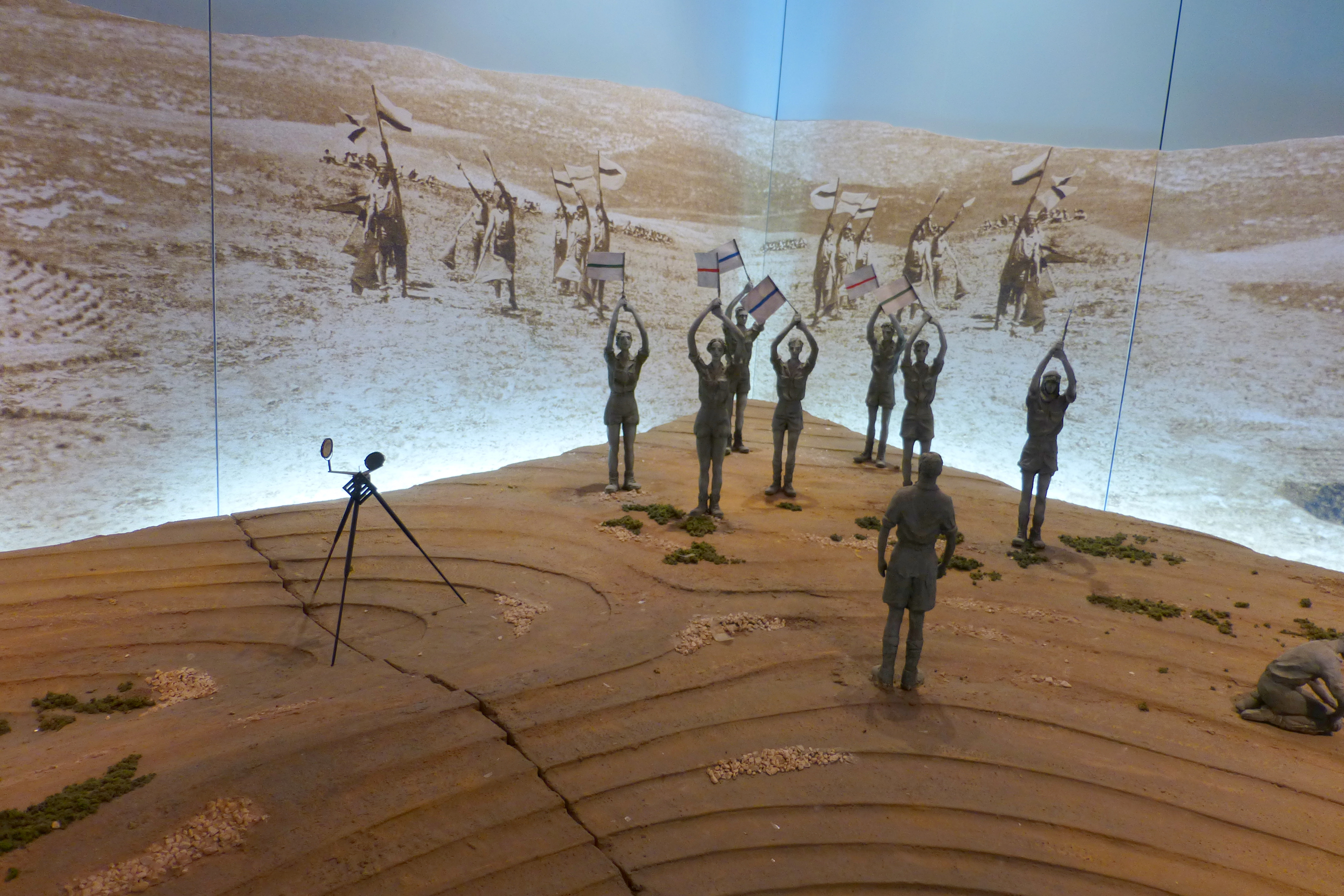 ג'וערה הוא בסיס גדנ"ע ומוזיאון הנמצאים על גבעה ברמות מנשה, במיקום היסטורי ששימש בעבר כבסיס ההדרכה המרכזי למפקדים של ארגון "ההגנה". שמה העברי של הגבעה הוא "גבעת נֹח".